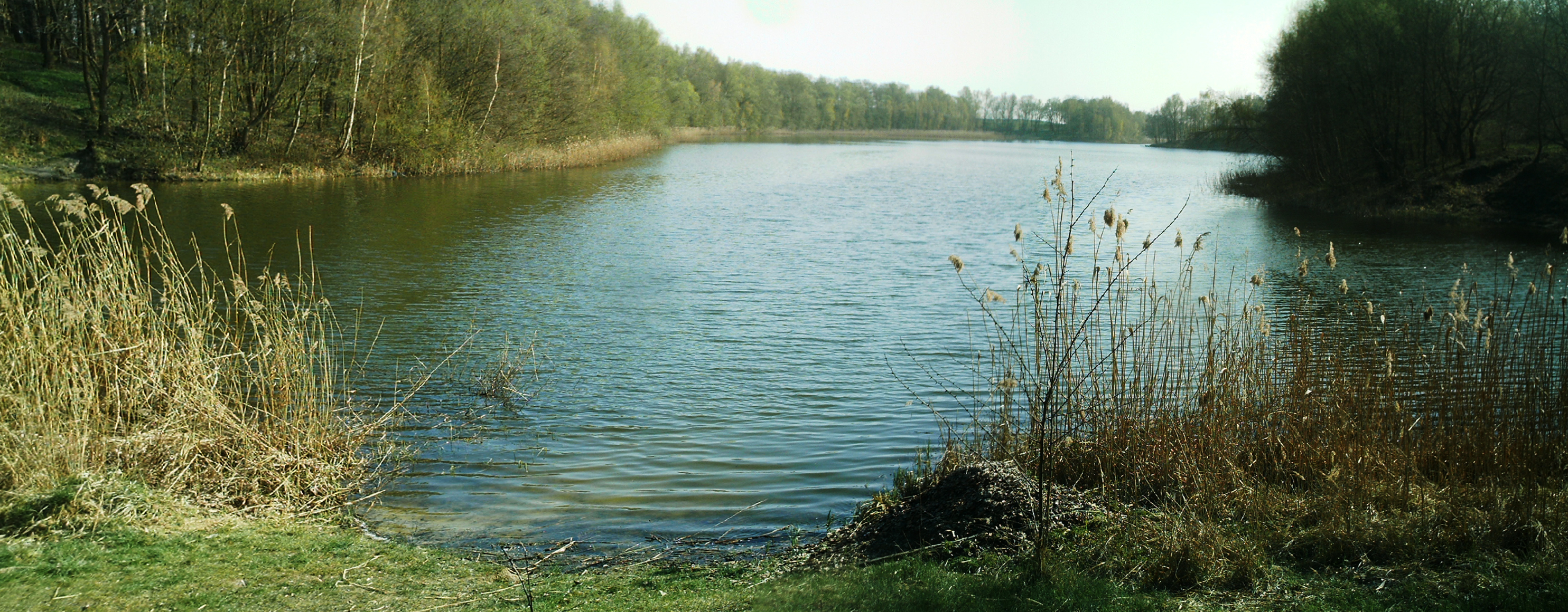 Der Demenzsee bei Rosenthal im Uecker Randow- Kreis